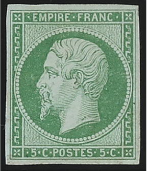 Timbre français type Napoléon III, vert sur vert.